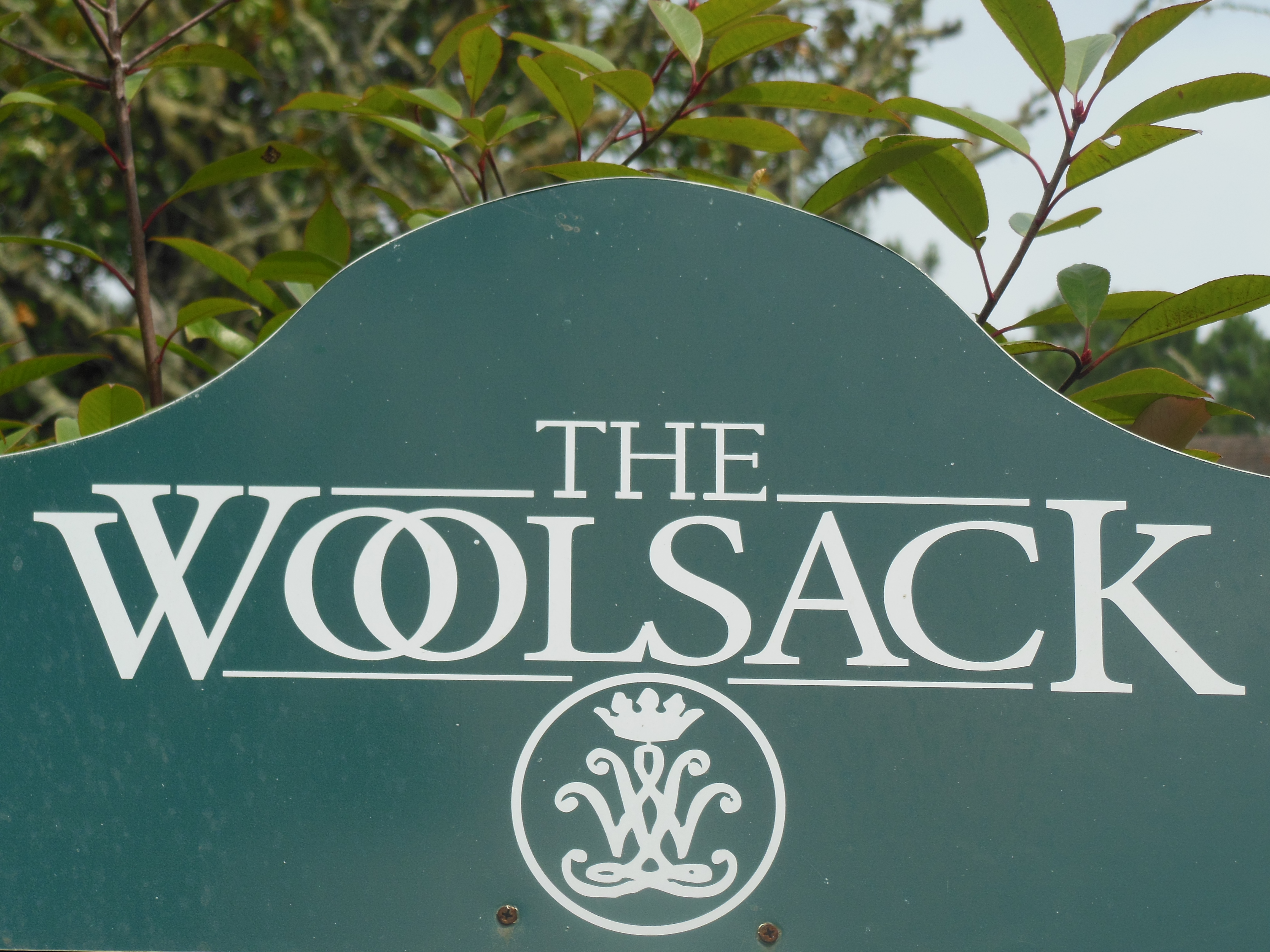 Logo du château de Woolsack à Mimizan (Landes, France)